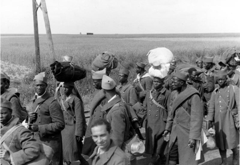 Franz. Kriegsgefangene